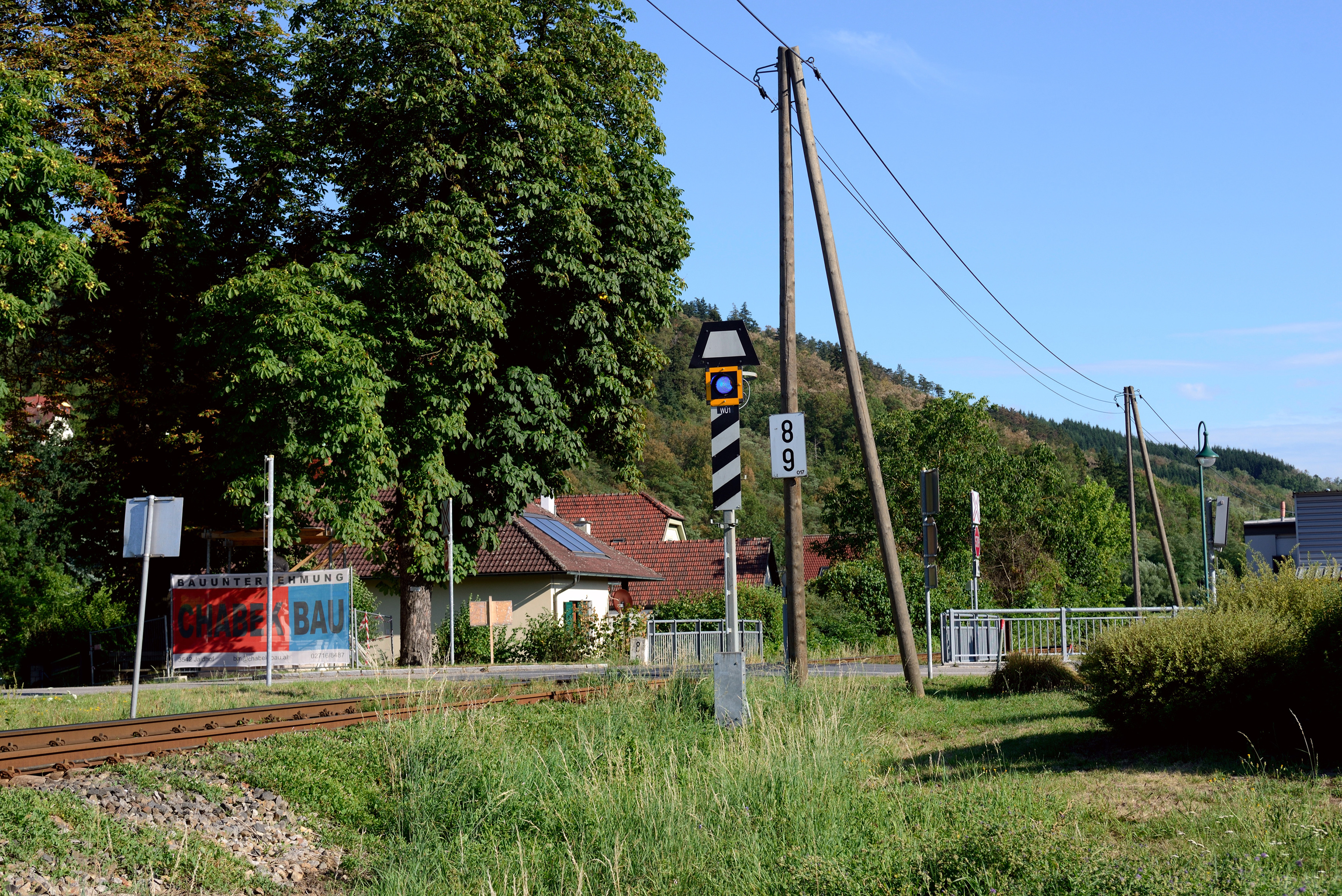 Nördliche Trapeztafel & Weichenüberwachungssignal am Bahnhof Schönberg am Kamp